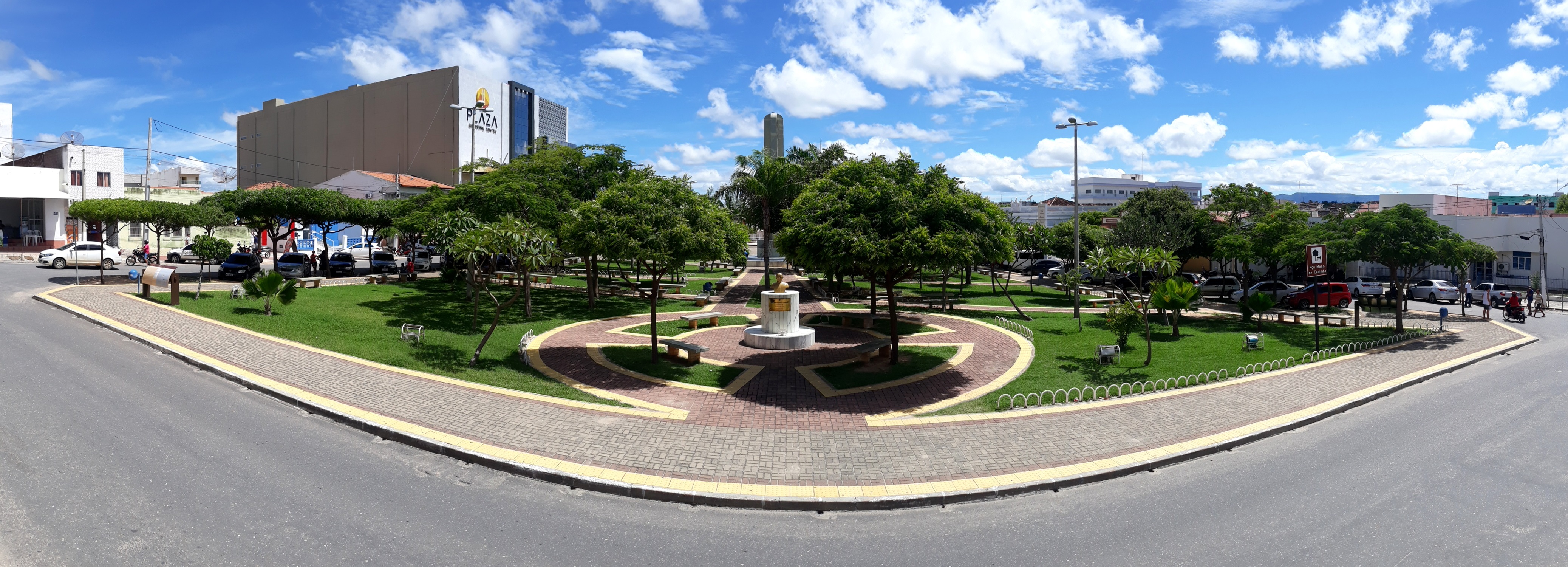 Panorâmica da Praça Monsenhor Caminha, no centro da cidade de Pau dos Ferros, no Rio Grande do Norte (Brasil). Ao fundo o obelisco e, à esquerda, o Plaza Shopping Center.